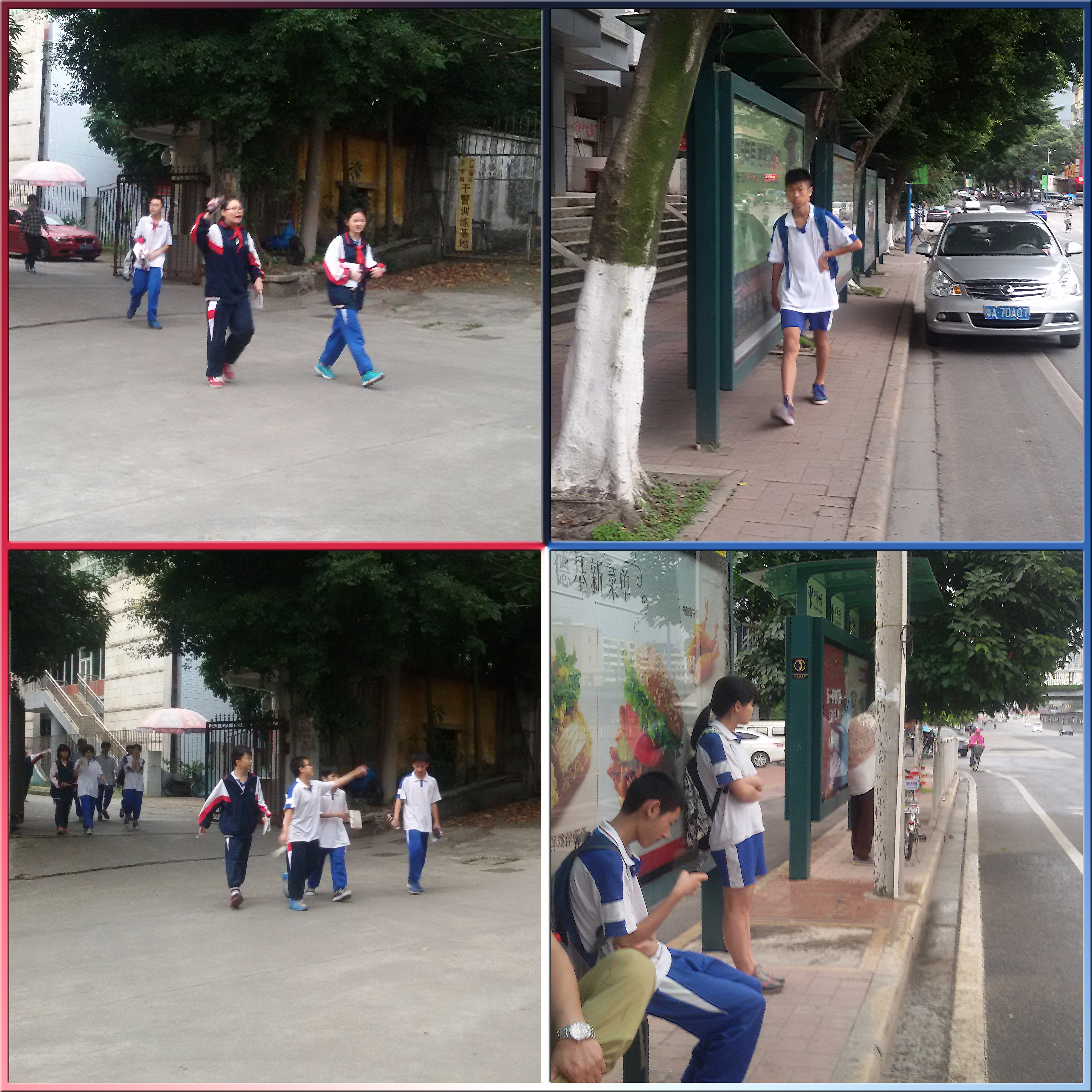 粵語: 廣州市第一二三中學嘅校服